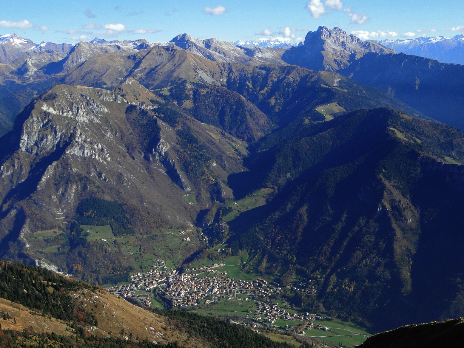 Panorama di Ardesio, valle Seriana (BG) con la Presolana sullo sfondo